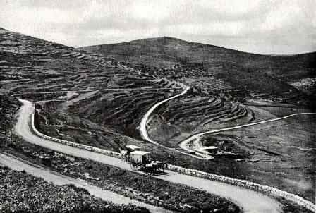 יש הרשאה באתר לעלות ברזולוציה נמוכה